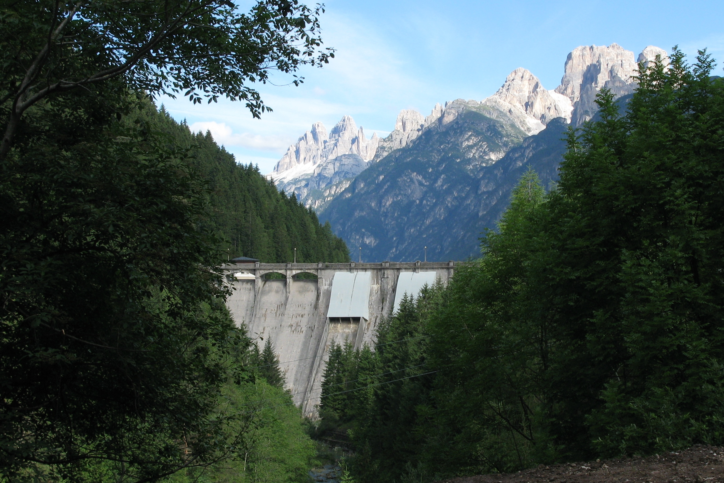 D'Staumauer zu Santa Caterina. Kategorie:Barragen an Italien